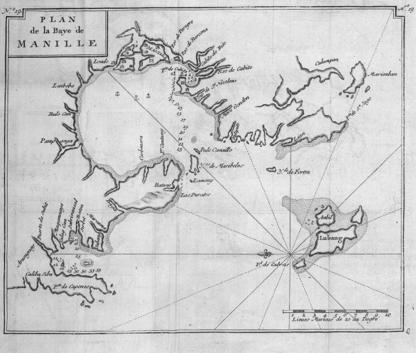 [Illustrations de Voyage autour du monde] Auteur : George Anson Éditeur : Henri-Albert Gosse et Compagnie (Genève) 1750